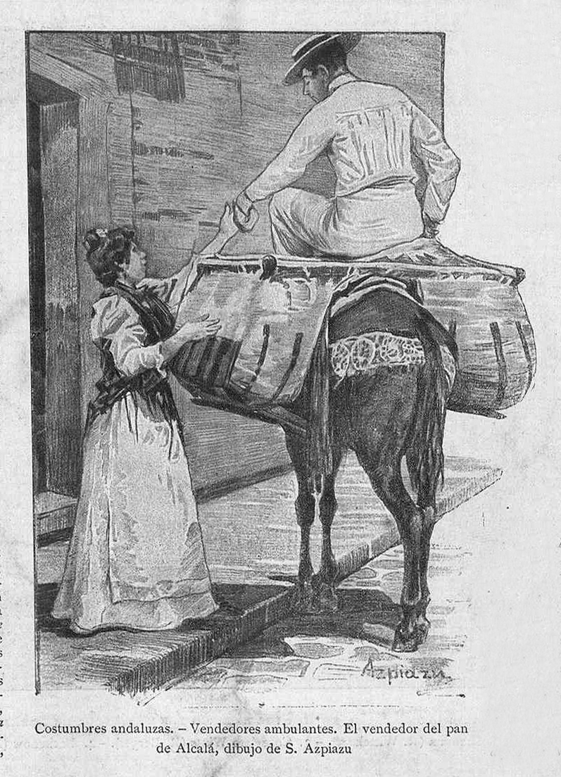 Costumbres andaluzas. Vendedores ambulantes. El vendedor del pan de Alcalá, dibujo de S. Azpiazu.